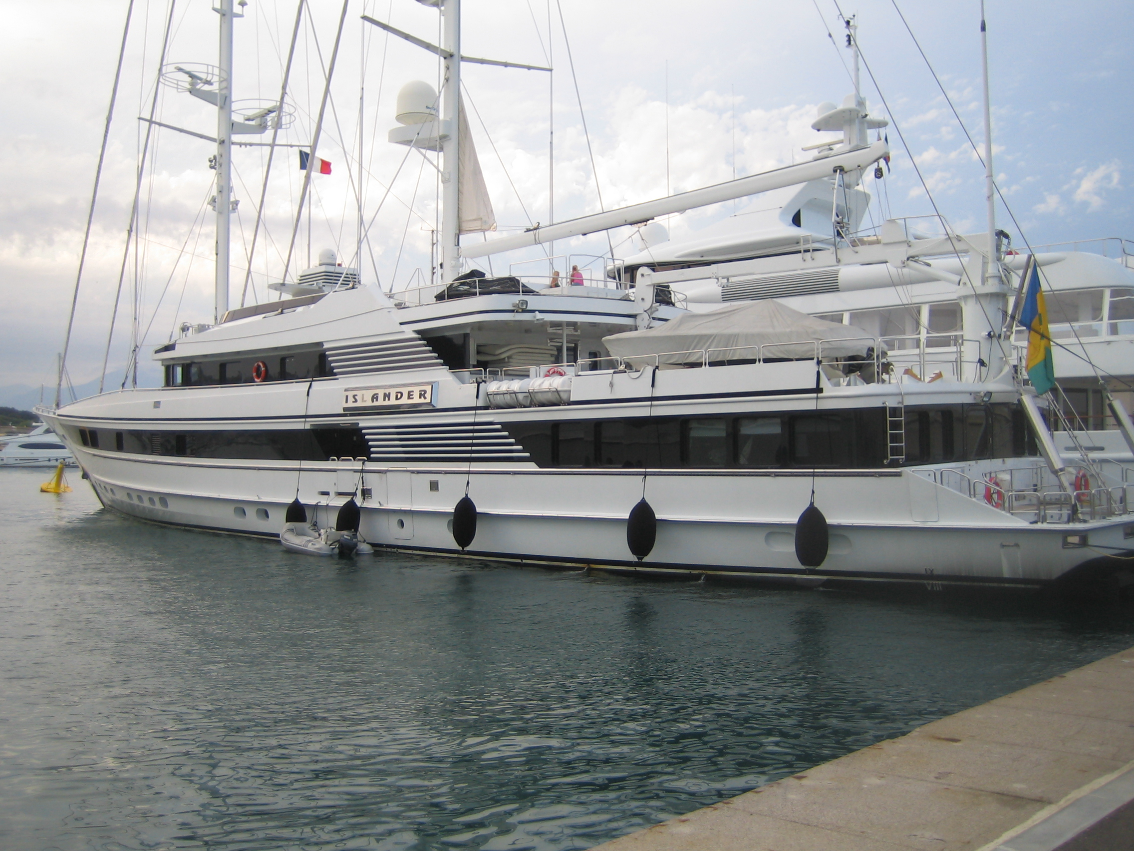 L'Islander au port d'Antibes (59 mètres-192 feet). Ancien nom (former name) : The Other Woman.